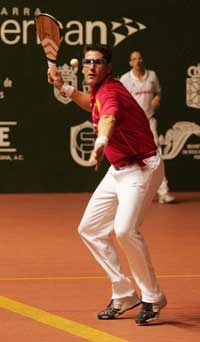 paleta seleccion